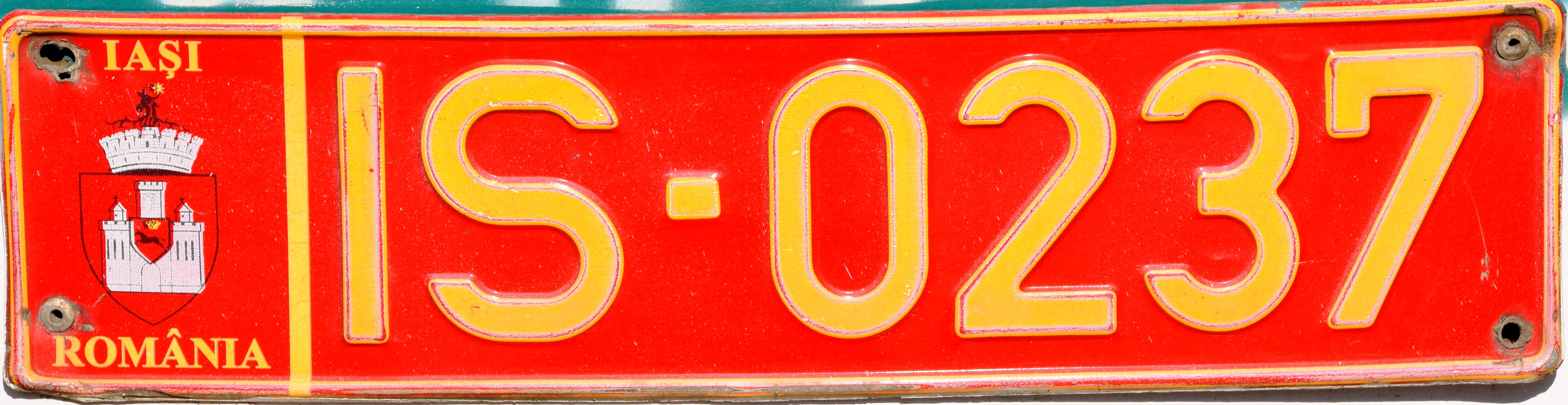 Iași tram kenteken plaat